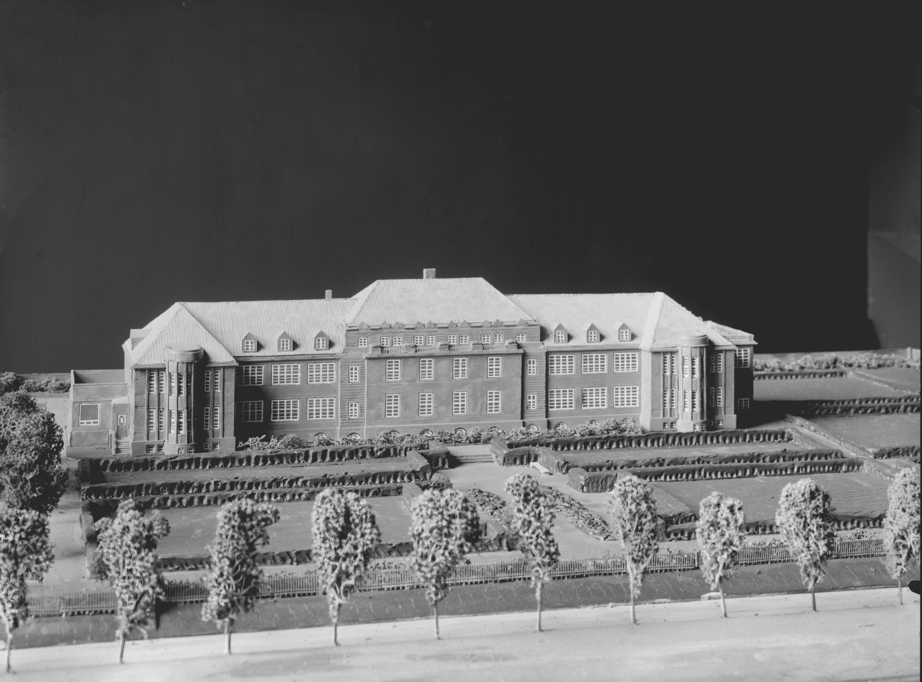 Krankenhaus Cuxhaven [Staatskrankenhaus Cuxhaven] (Cuxhaven): Modell SchumacherWV Nr. 235